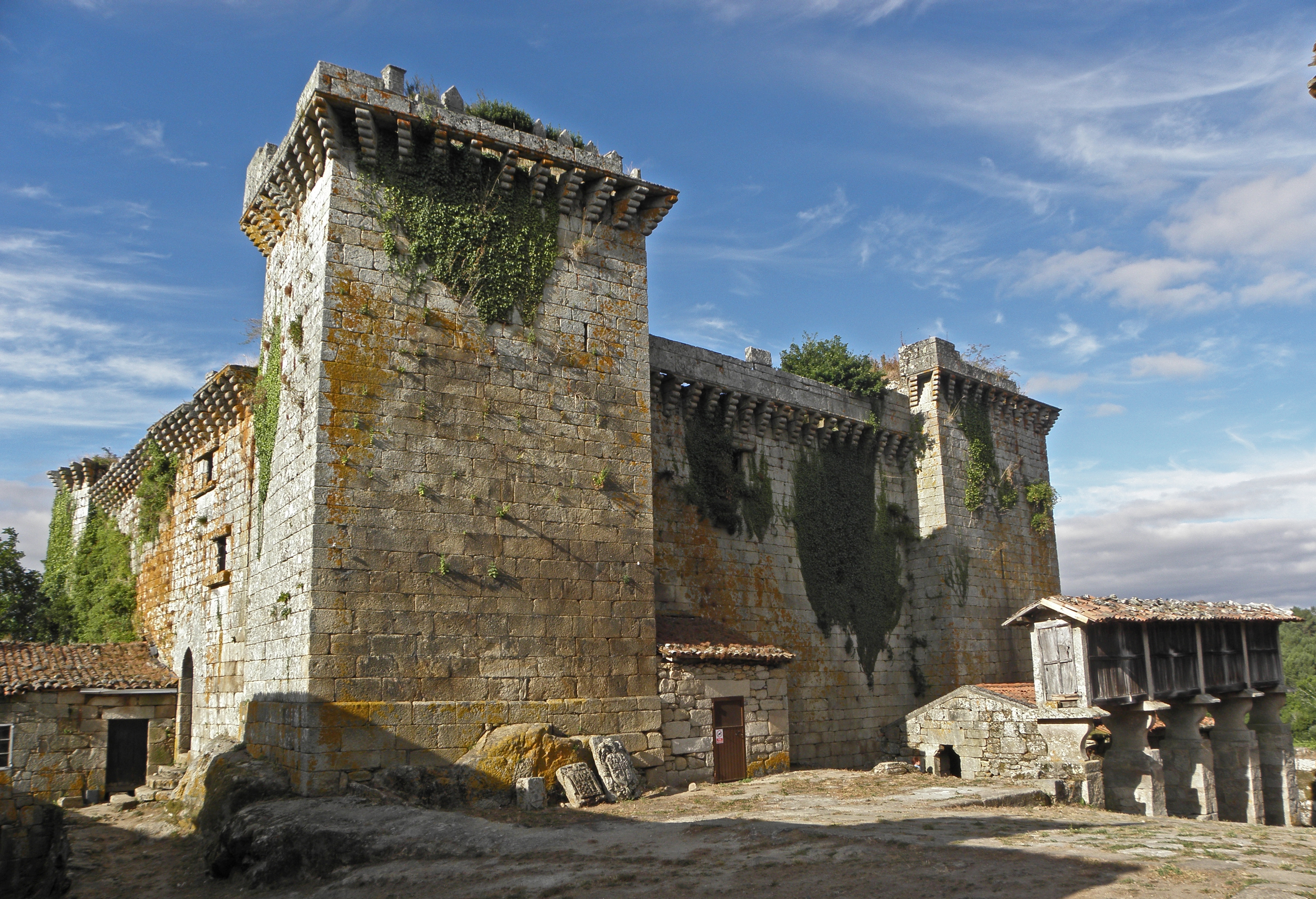 Castelo de Pambre, Palas de Rei